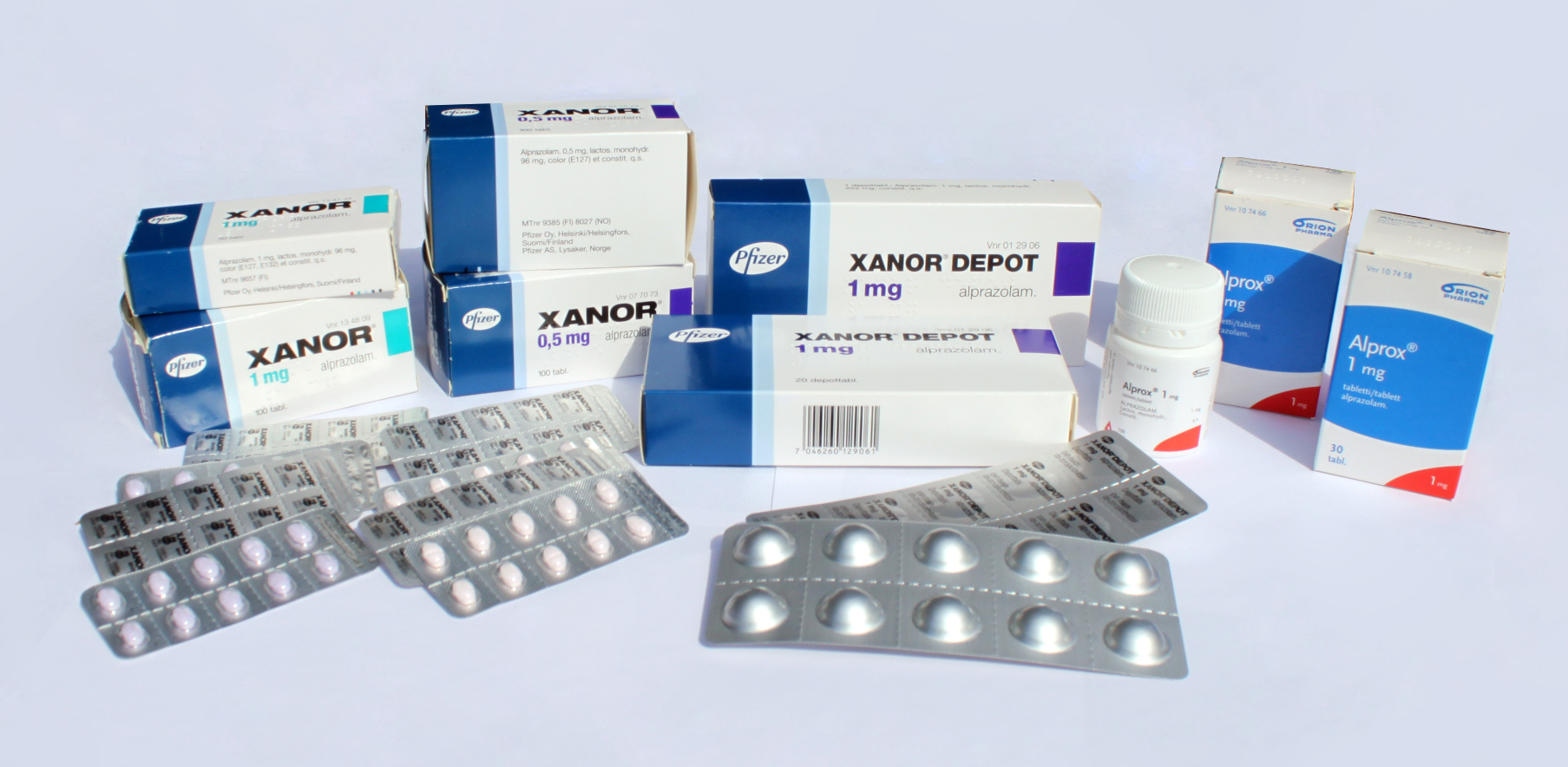 Alpratsolaamiin perustuvia lääkkeitä